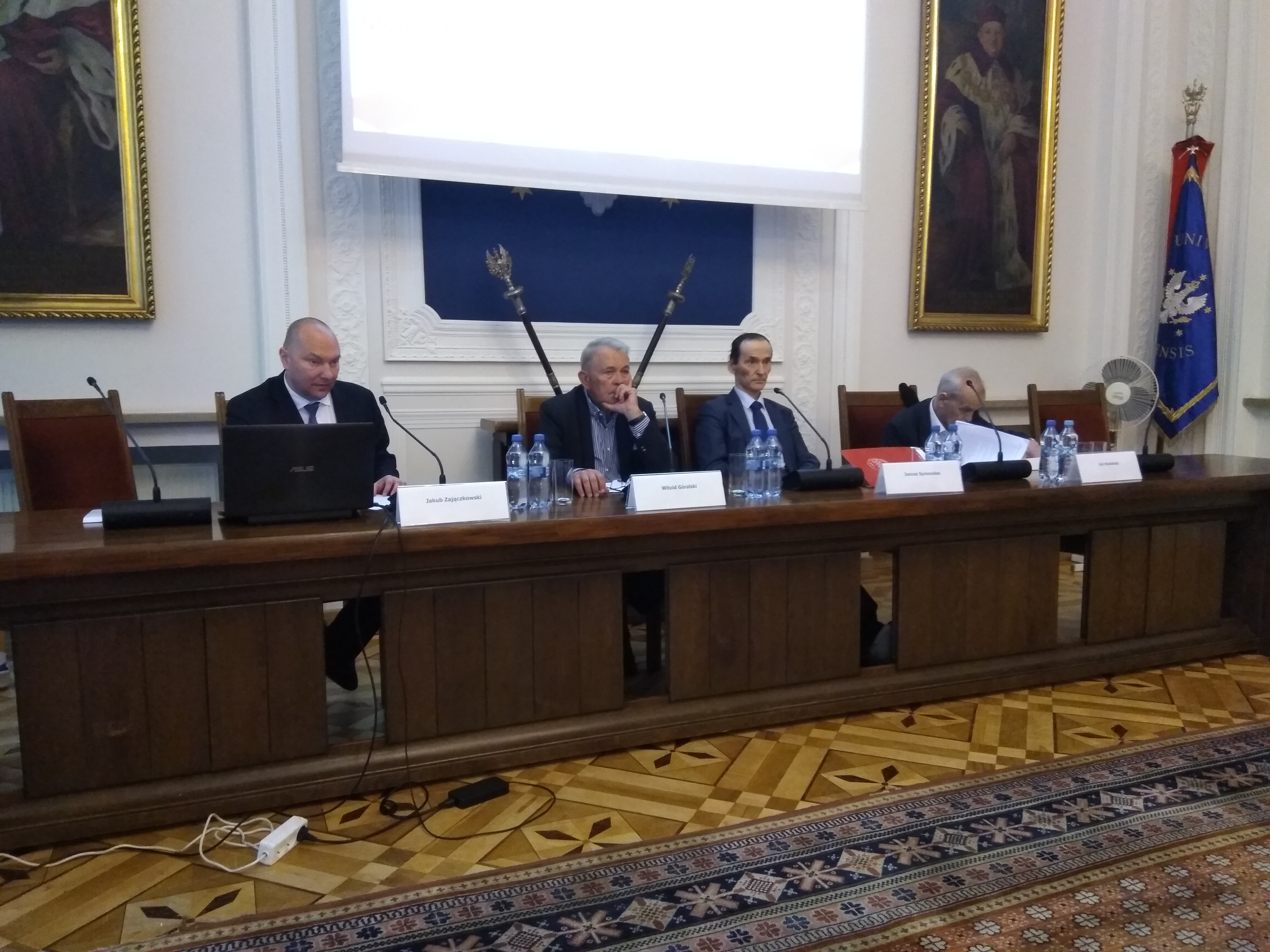 prof. prof. Jakub Zajączkowski, Witold Góralski, Janusz Symonides, Jan Rowiński podczas Konferencji „pożegnalnej” ISM w Pałacu Kazimierzowskim UW